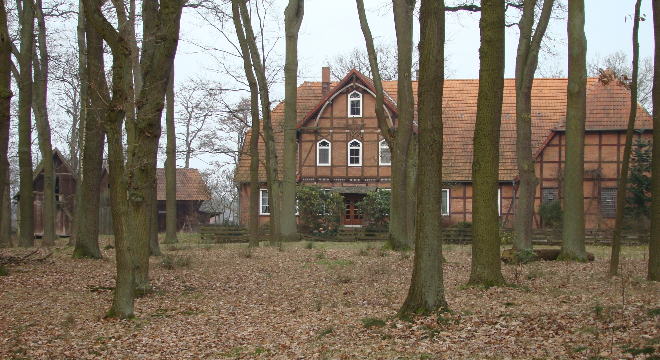 Der Lutterhof mit Treppenspeicher und Eichen